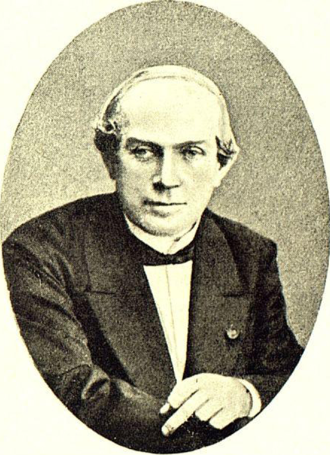 Брандт Егор Егорович, коммерции советник, председатель Санкт-Петербургского биржевого комитета